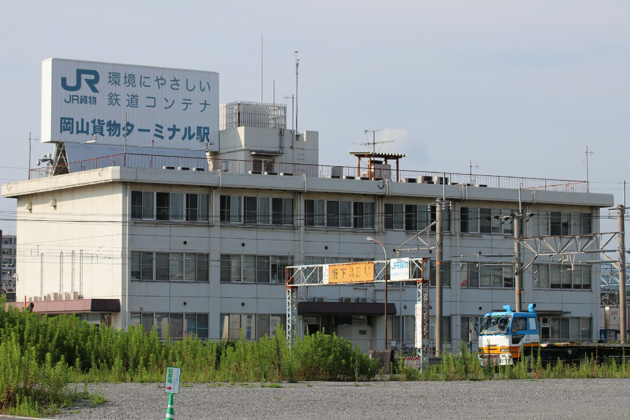 JR貨物・岡山貨物ターミナル駅 駅舎